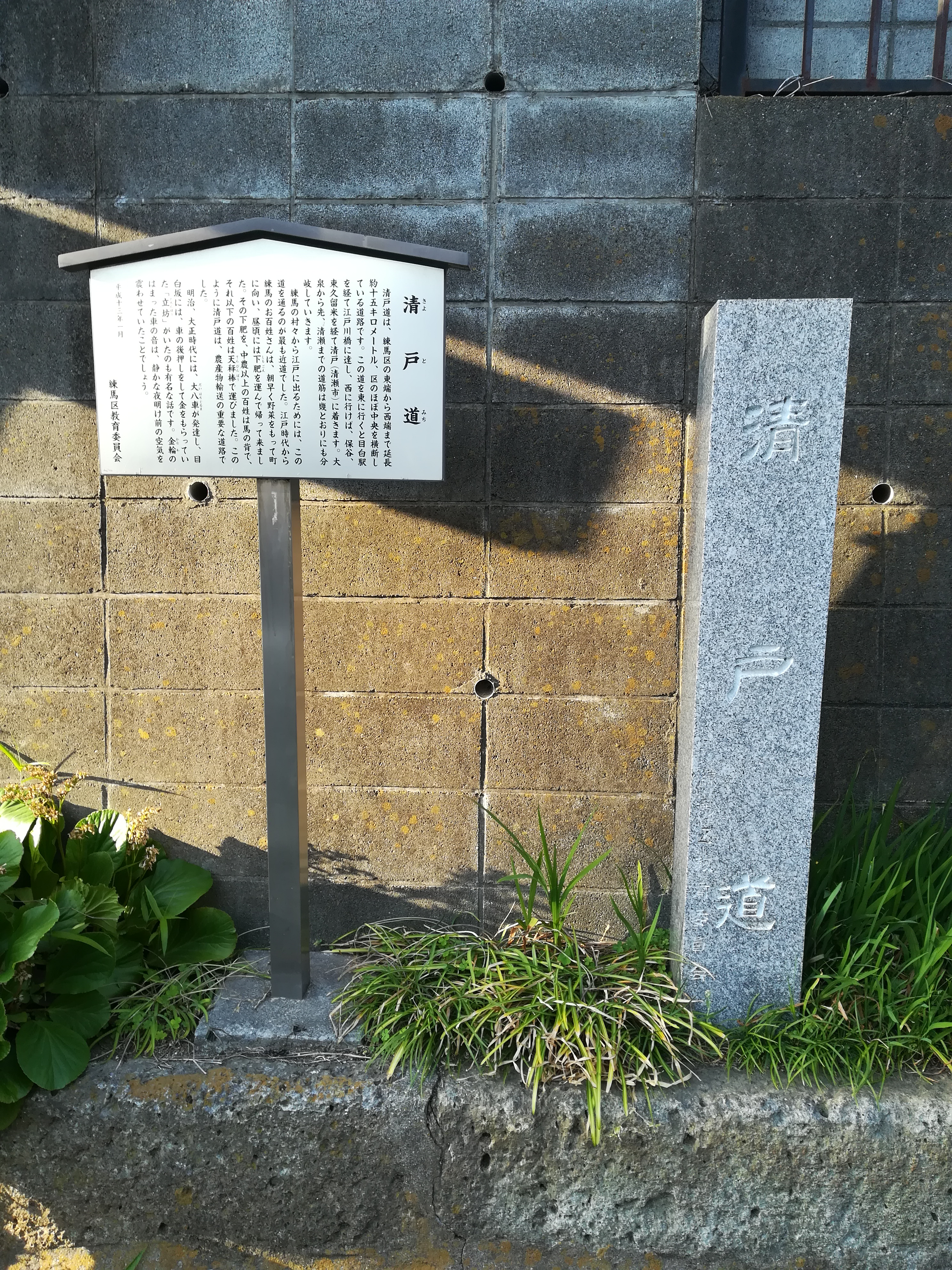 清戸道石碑。東京都練馬区貫井。